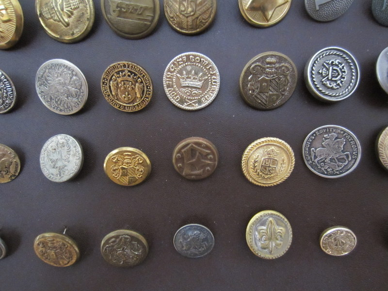 Knoflíky vyráběné z kovu, používaly se hlavně na uniformy